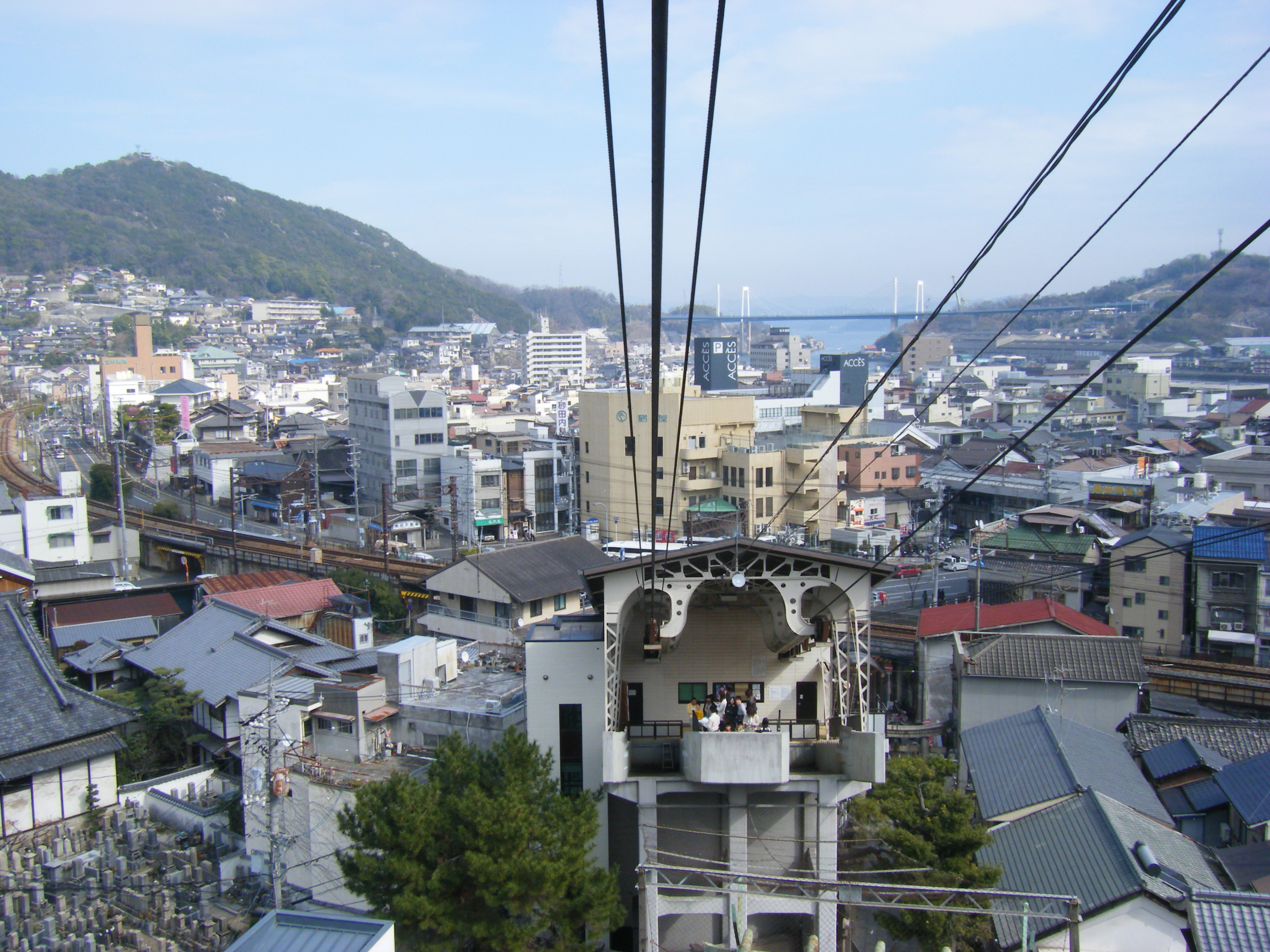 尾道千光寺山ロープウェイ山麓駅